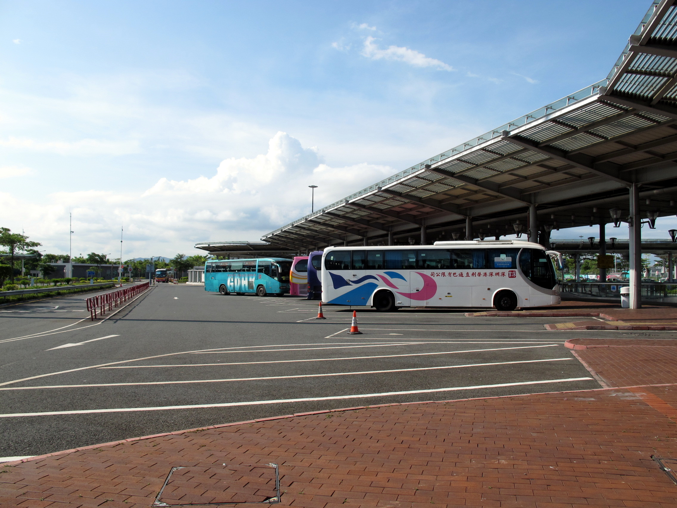 Shenzhen Bay Port Passenger Terminal Bus stop